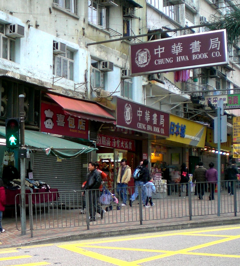 觀塘協和街中華書局